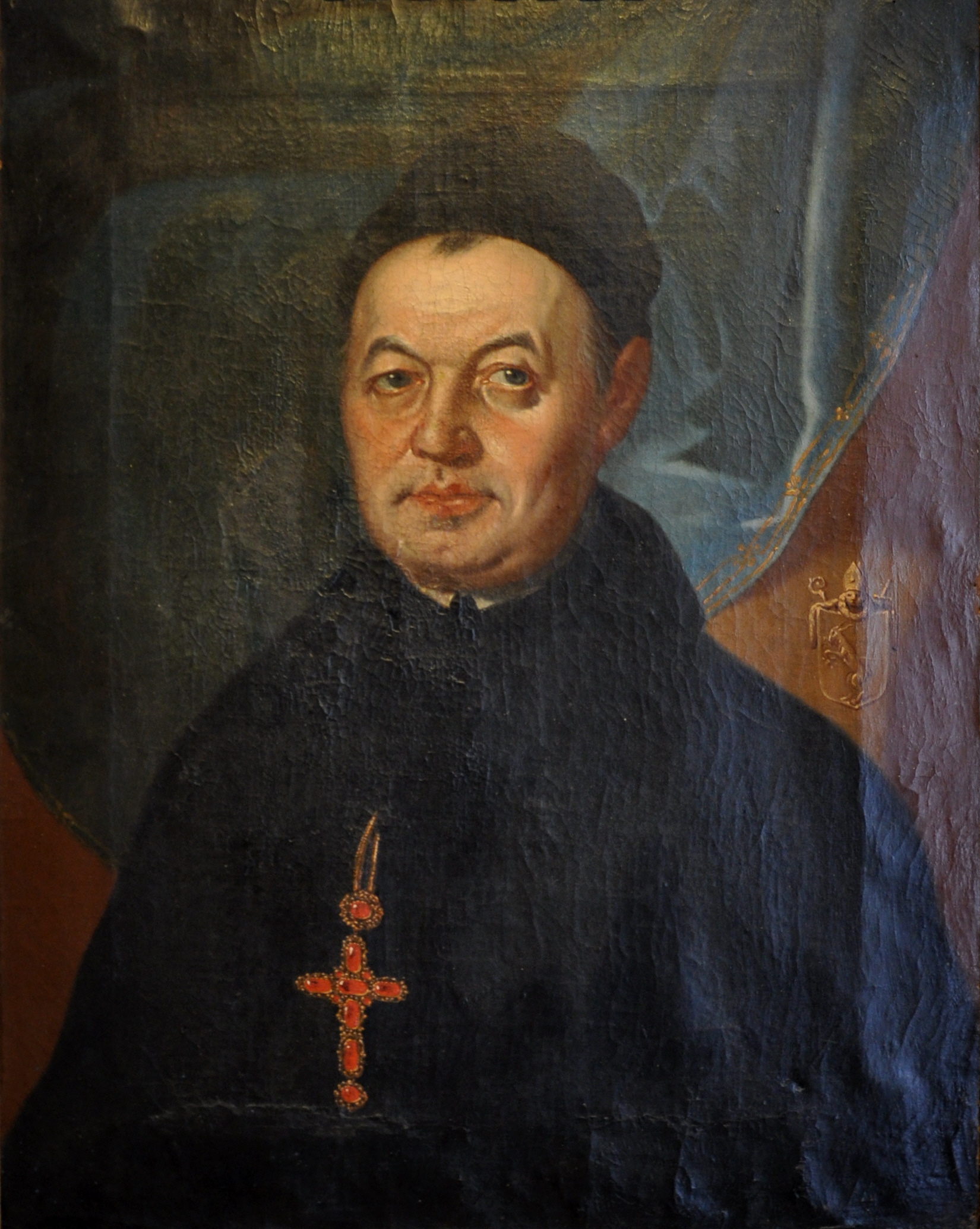 Abt Anselm Rittler, Öl auf Leinwand, um 1800 Stadtmuseum Weingarten; Leihgabe Staatliche Schlösser und Gärten Baden-Württemberg/Benediktinerabtei Weingarten